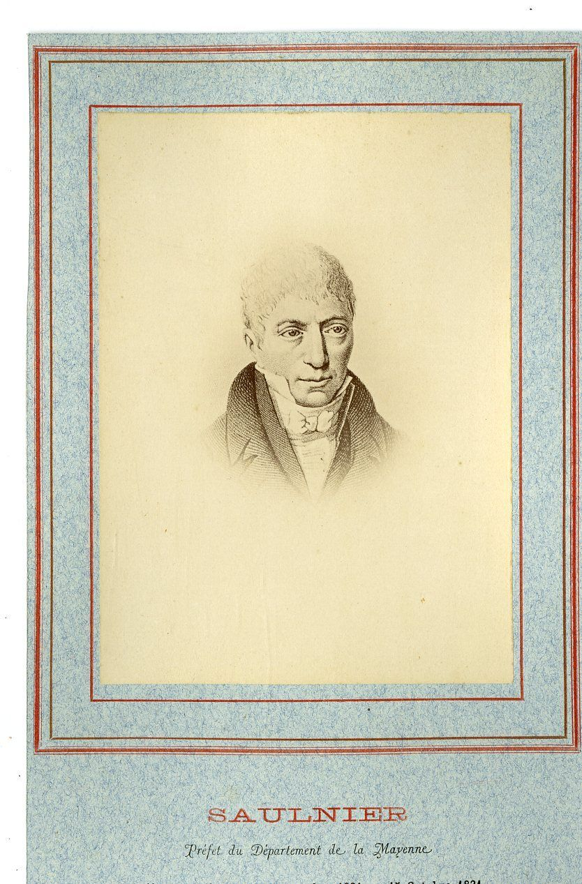 Sébastien Louis Saulnier, préfet de police.